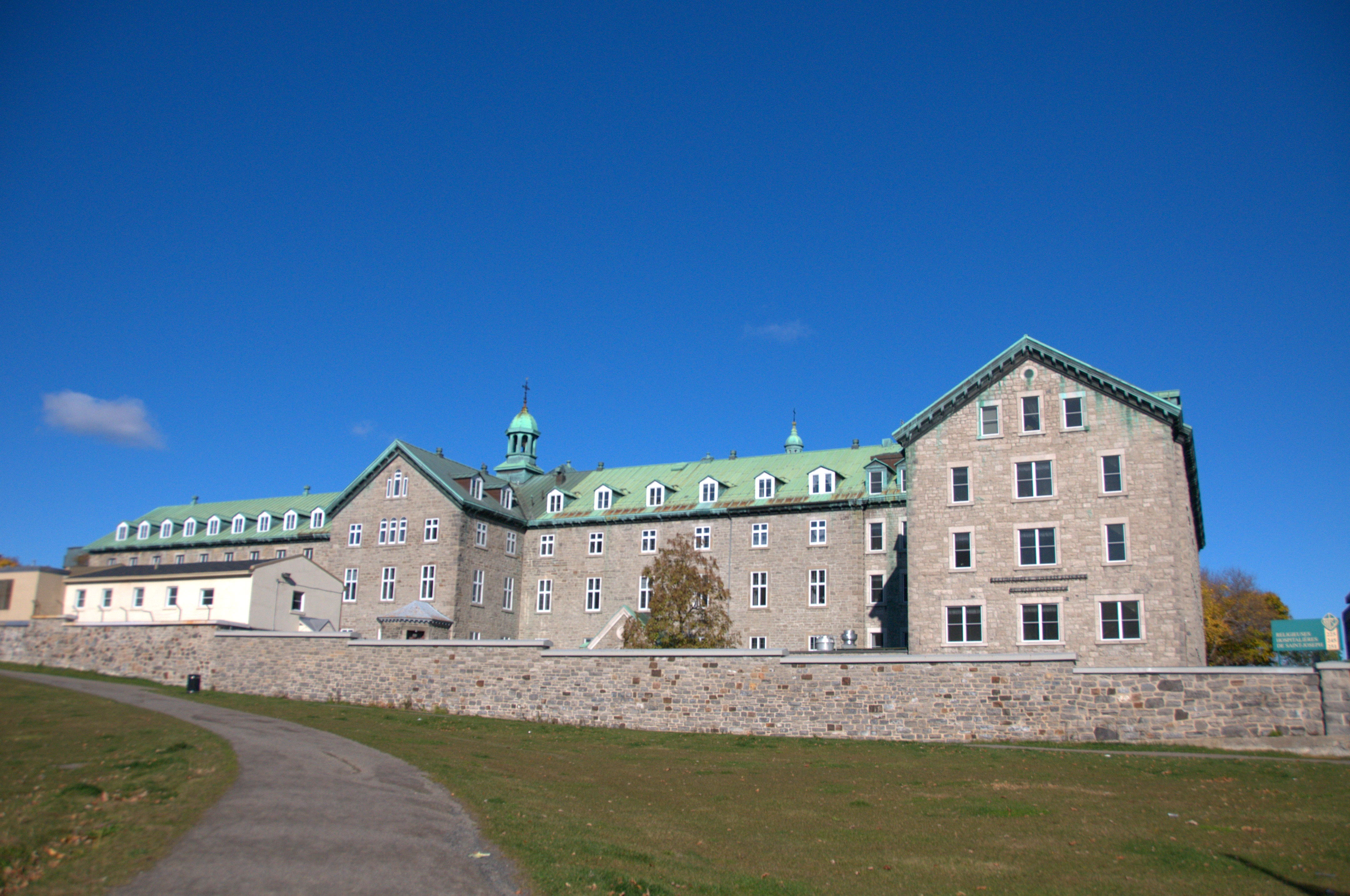 Hôtel-Dieu de Montréal, from Avenue du parc Montreal